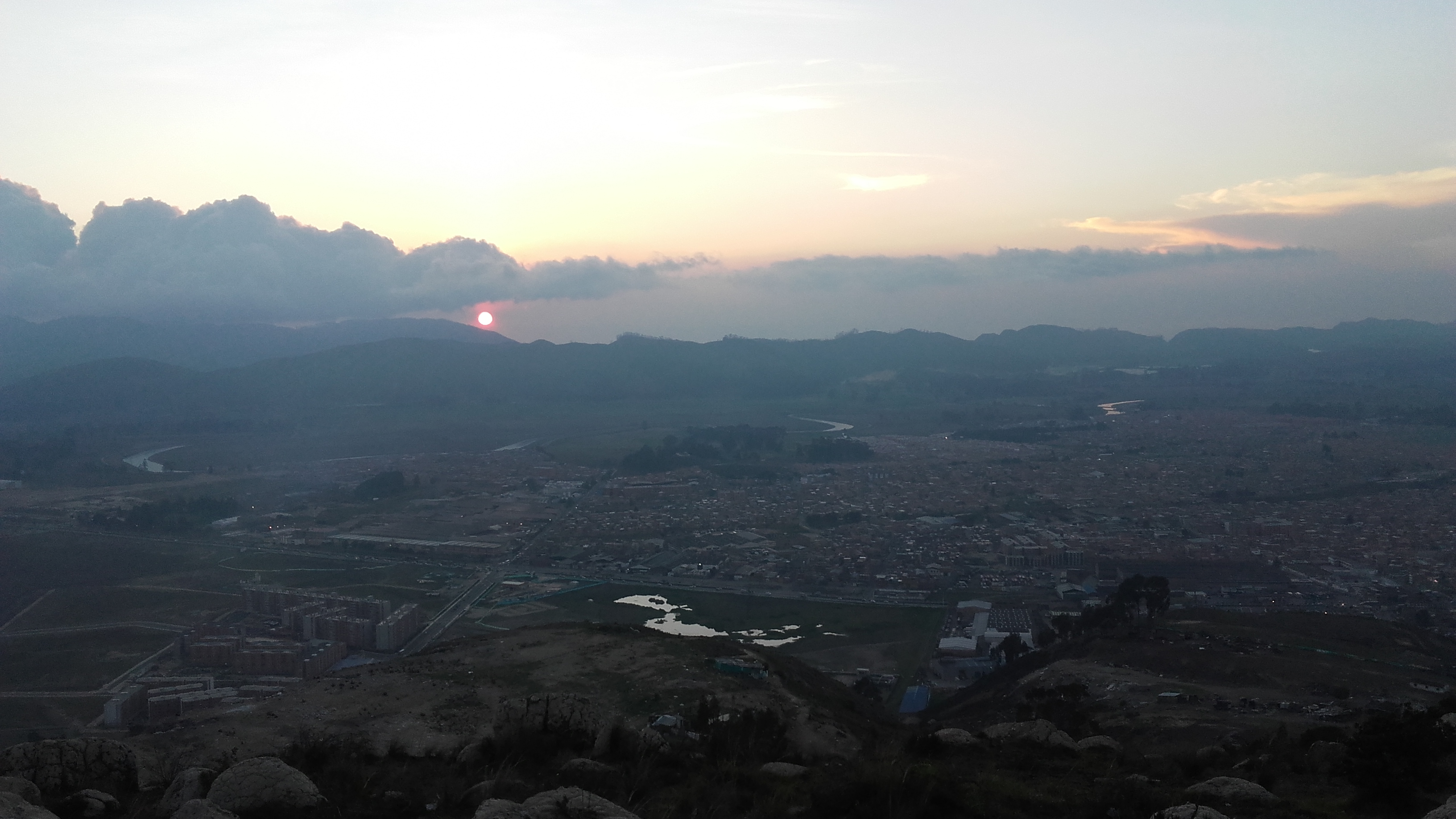 Atardeser